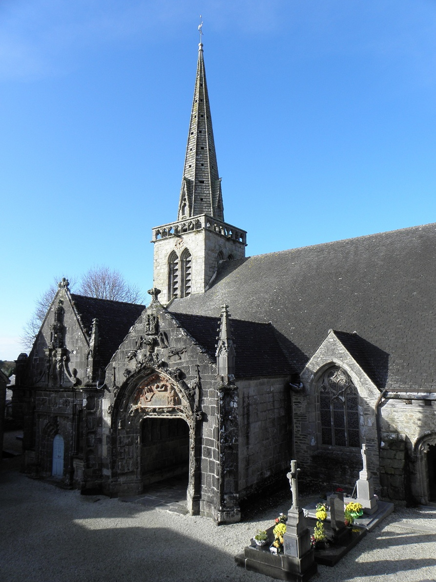 Flanc sud de l'église Saint-Salomon de La Martyre (29).